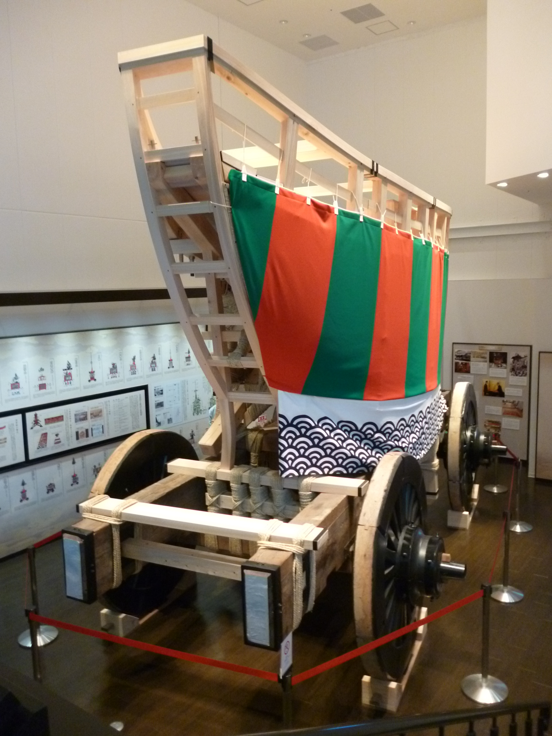 Carro allegorico del Gion Matsuri